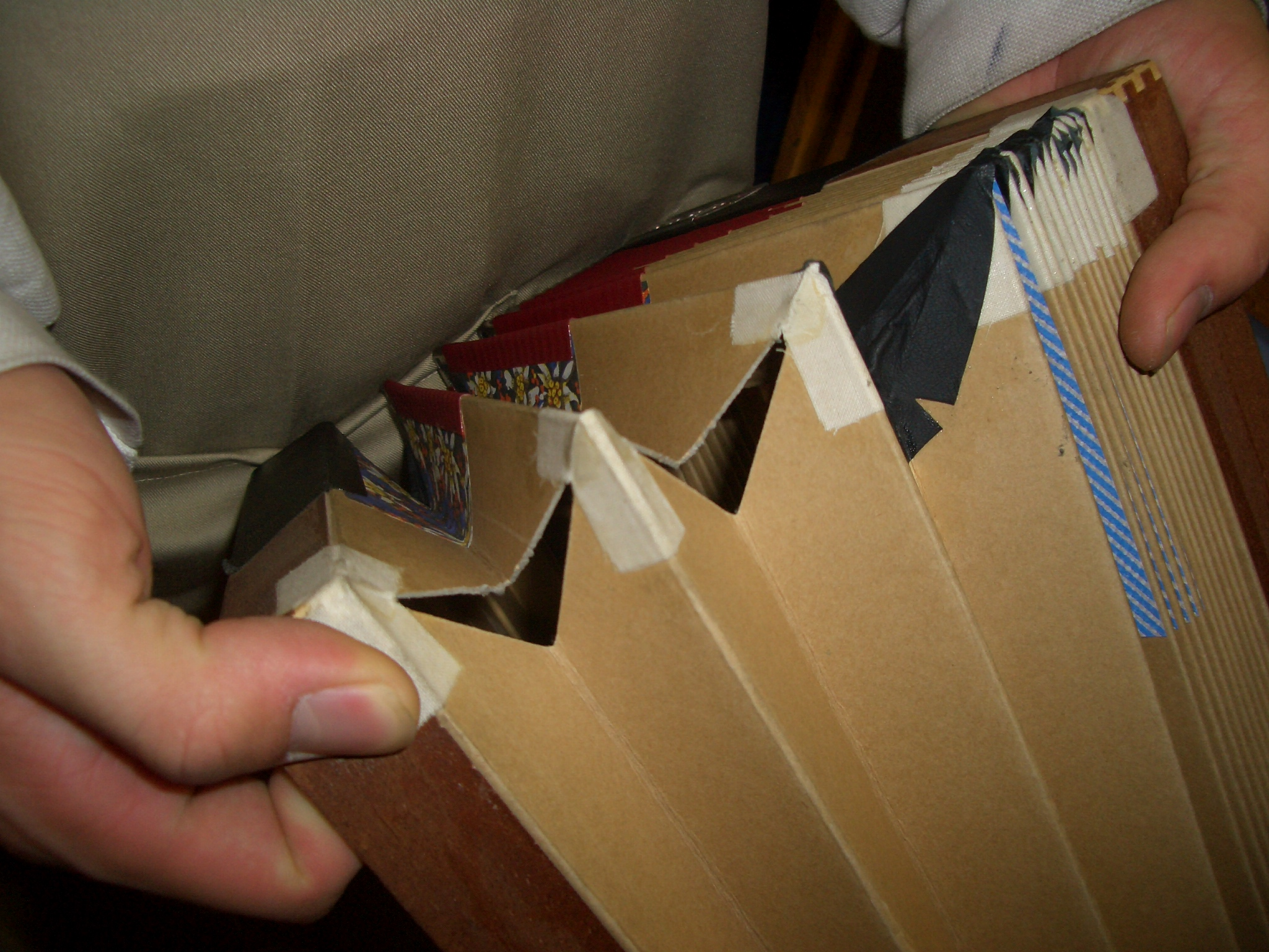 Akkordeonbalg demo